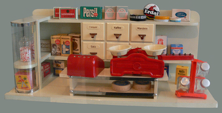 Kaufladen (Puppen-Kaufladen), Kindler & Briel (Kibri), Böblingen, 1957 Schlossmuseum Aulendorf (Zweigmuseum des Württembergischen Landesmuseums)